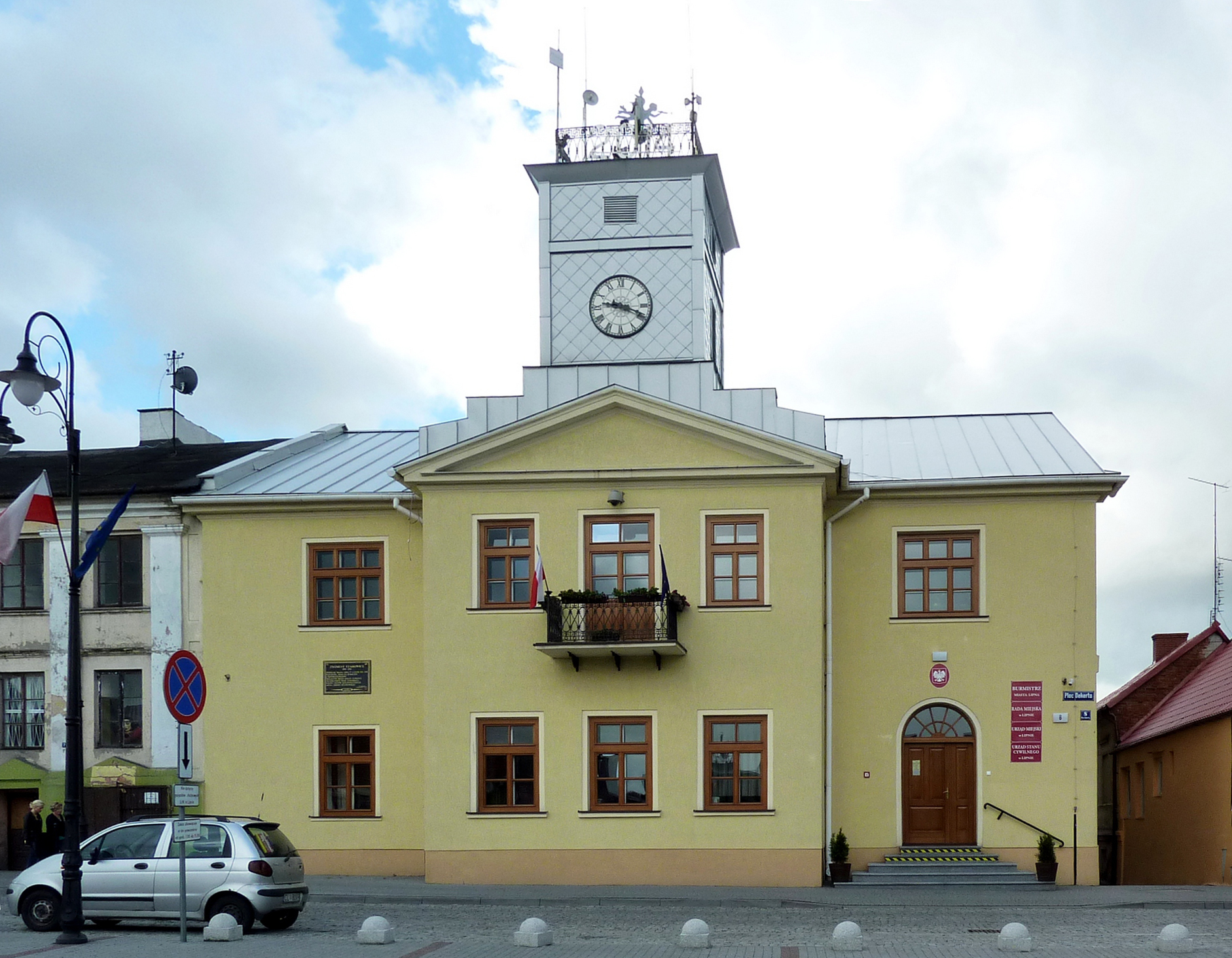 Ratusz w Lipnie (Plac Dekerta 8).